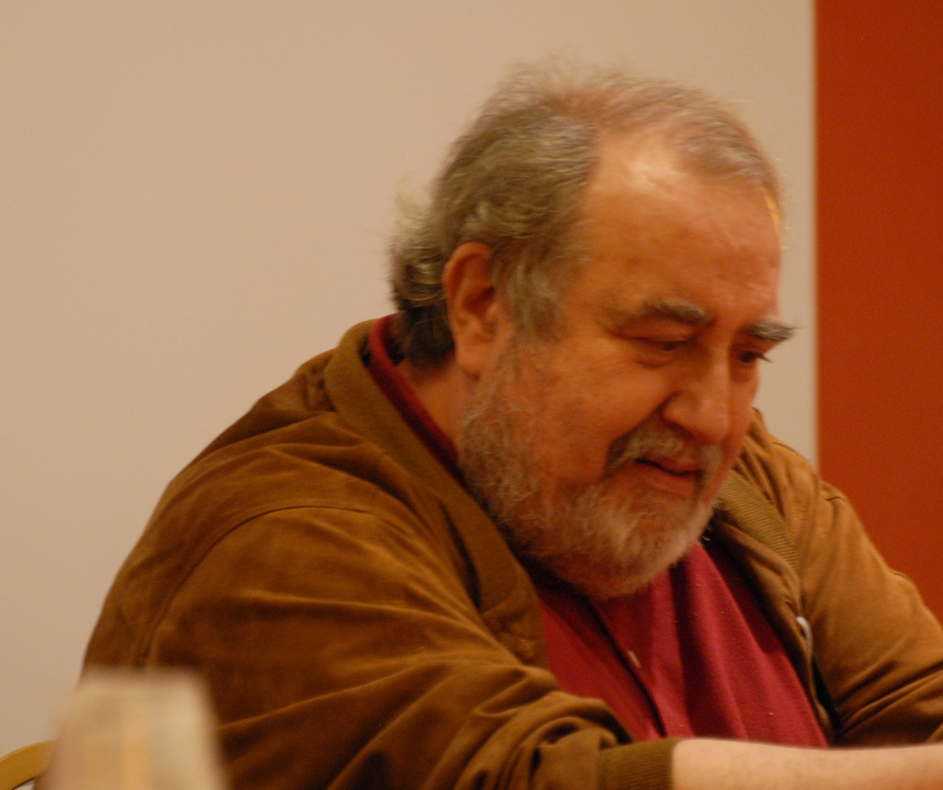 Lo scrittore e saggista di fantascienza italiano Riccardo Valla. Durante la convention Deepcon 11 / Italcon 36, 2010, panel Il sesso nella fantascienza italiana: strumento di conoscenza, oppio dei popoli o magia sexualis.